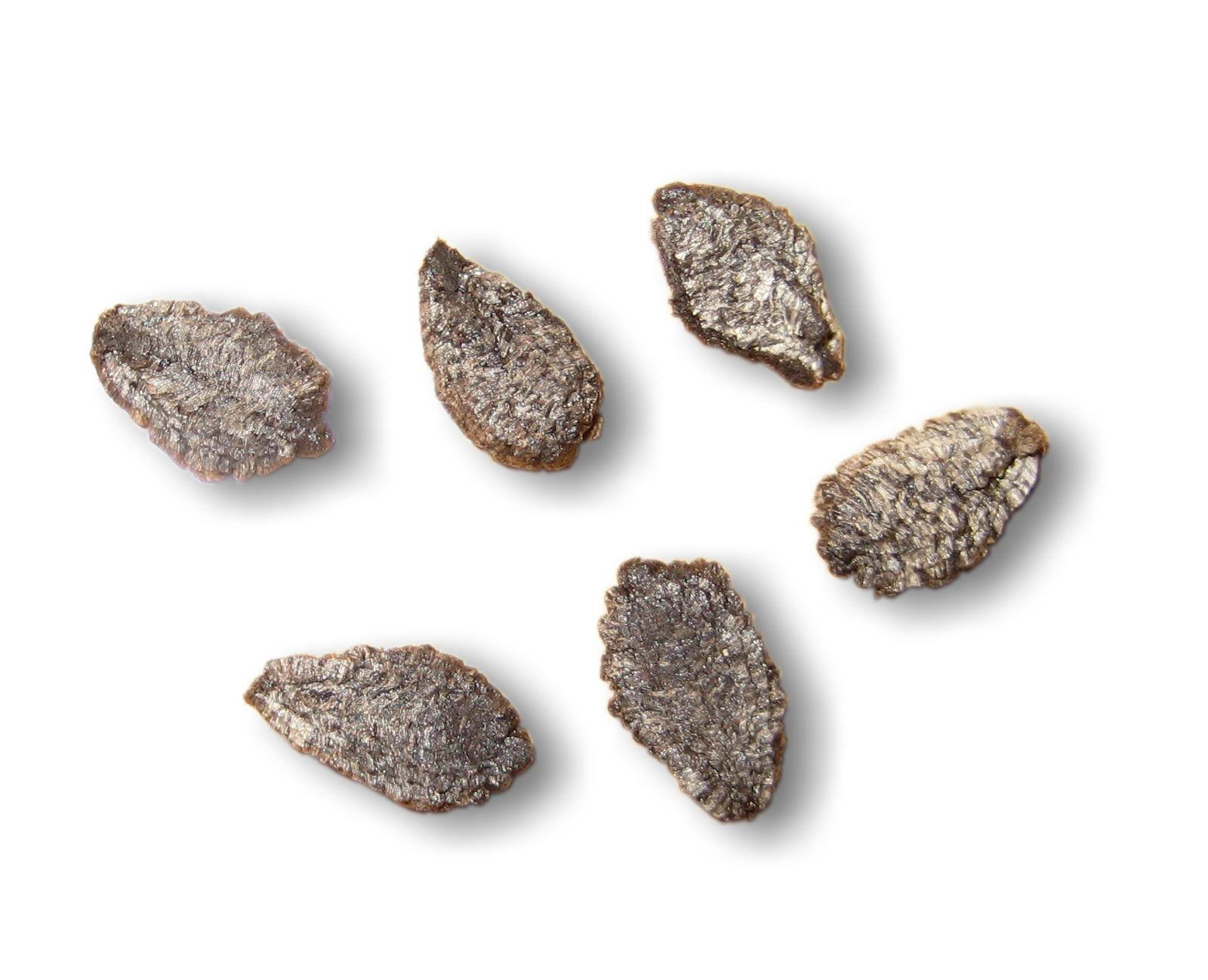 Ibicella lutea, seeds